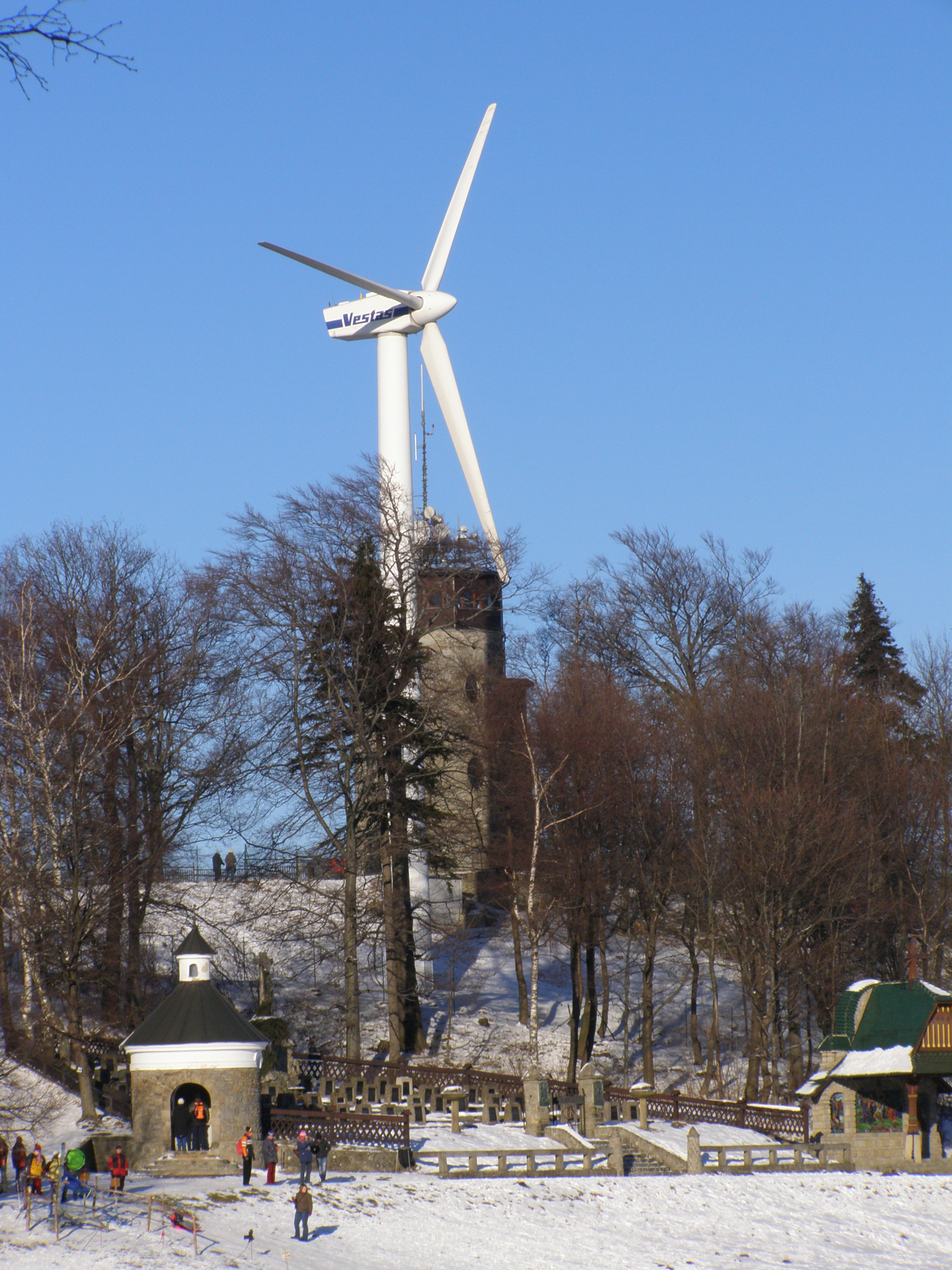 Česky: Hostýn, větrná elektrárna, vyhlídková věž a kaplička